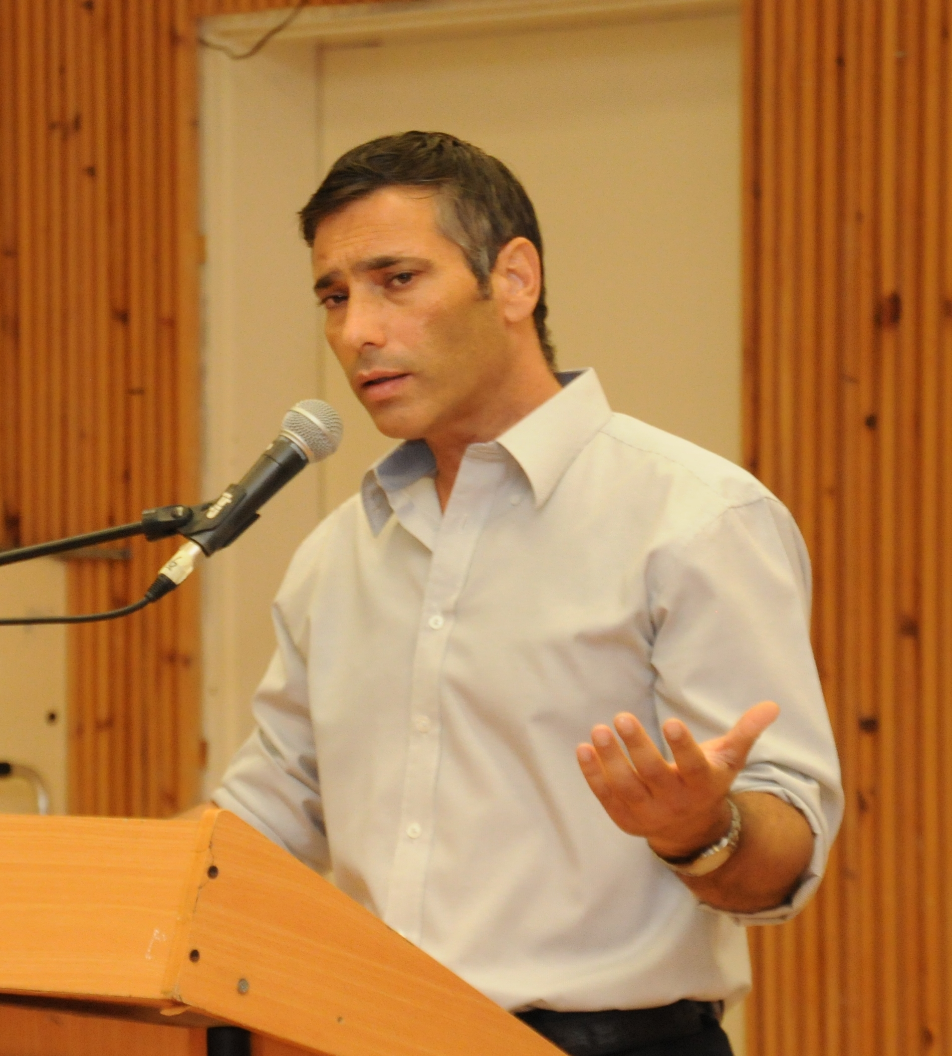 ירון קנר, 2013